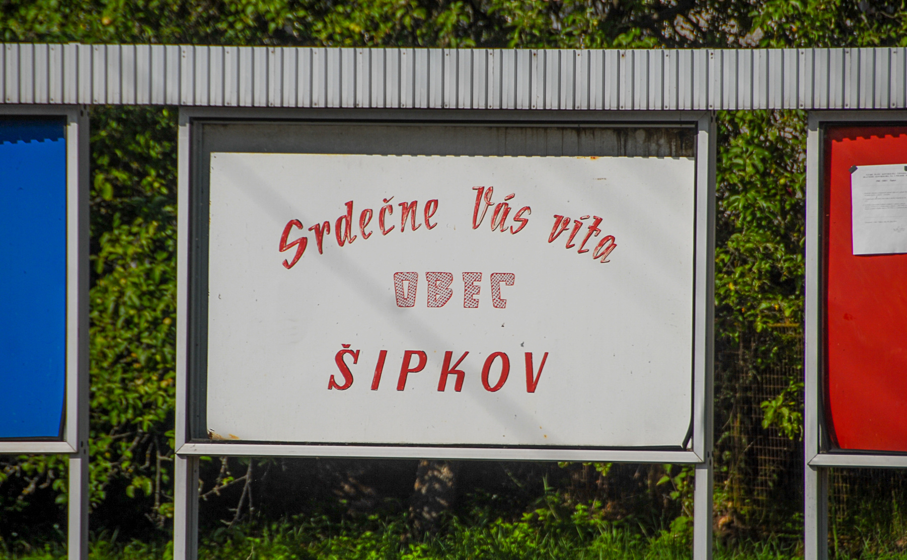 "Sie grüßt herzlich die Gemeinde Sipkov", Sommer 2016